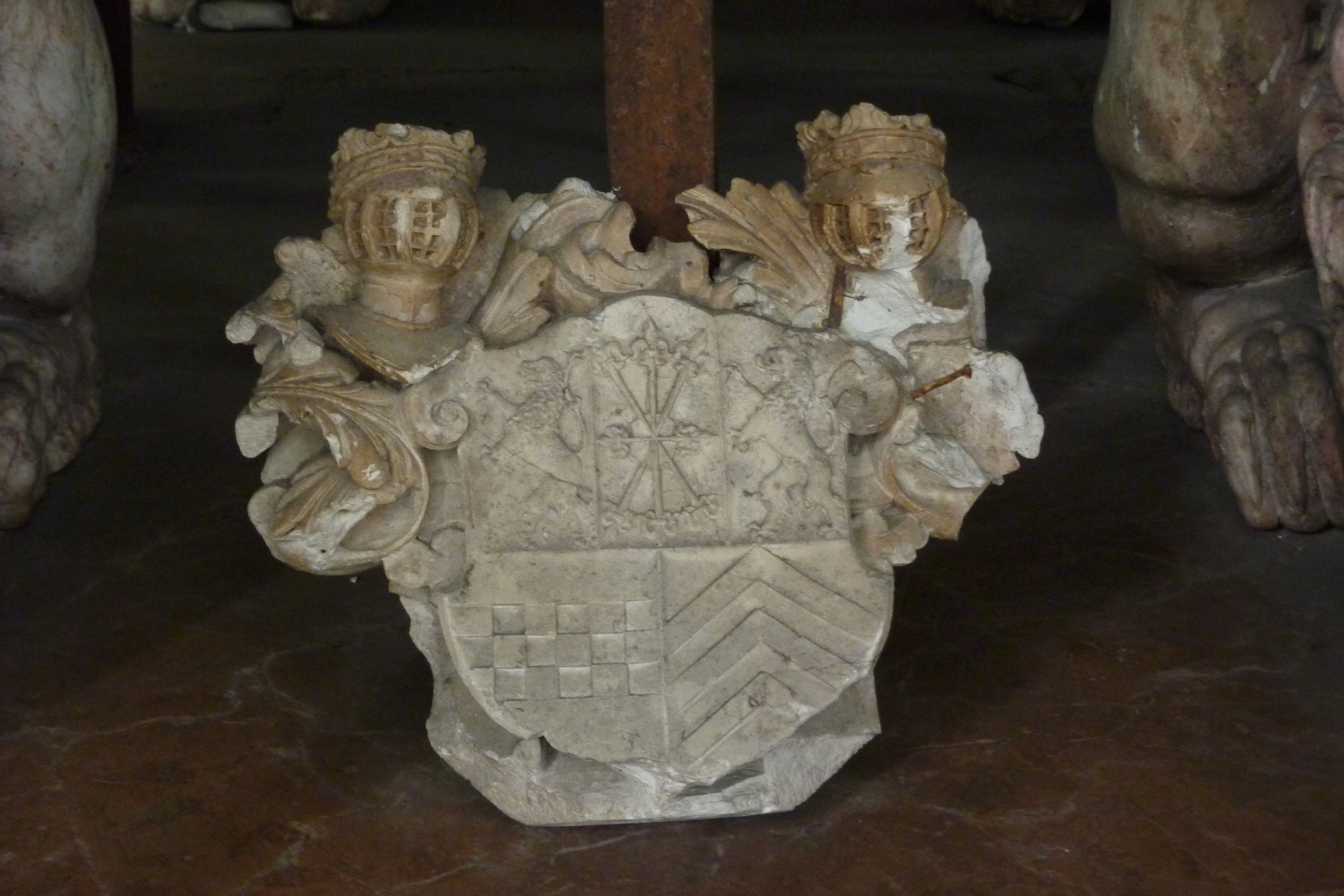 Kenotaph der Pfalzgräfin Elisabeth von Pfalz-Neuburg in der Stadtpfarrkirche St. Martin in Lauingen im Landkreis Dillingen an der Donau (Bayern)